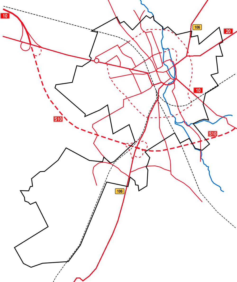 Schemat układu komunikacyjnego Stargardu, główne drogi istniejące i planowane, kolej, rzeki